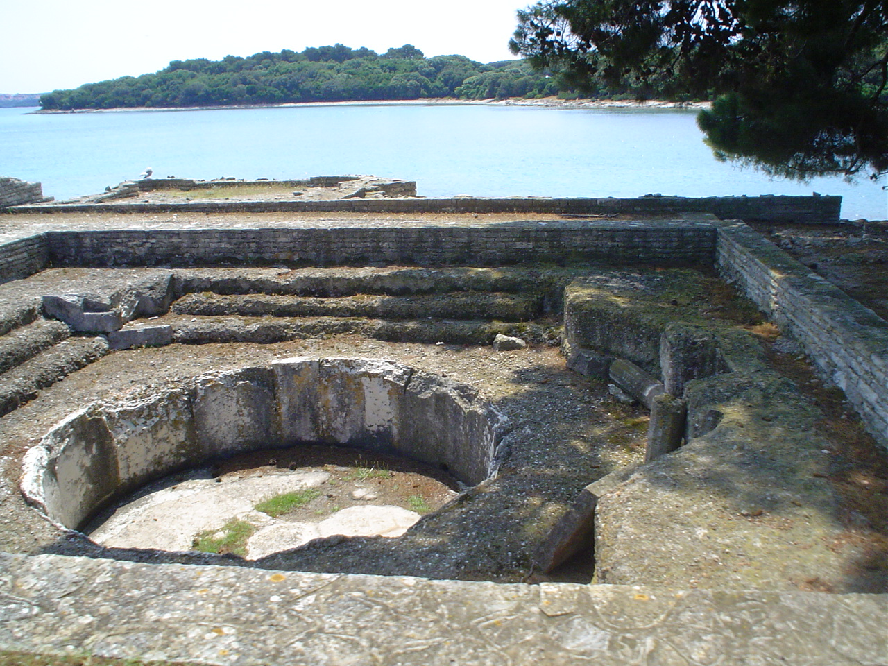 Naconal park Brijuni-Excavations